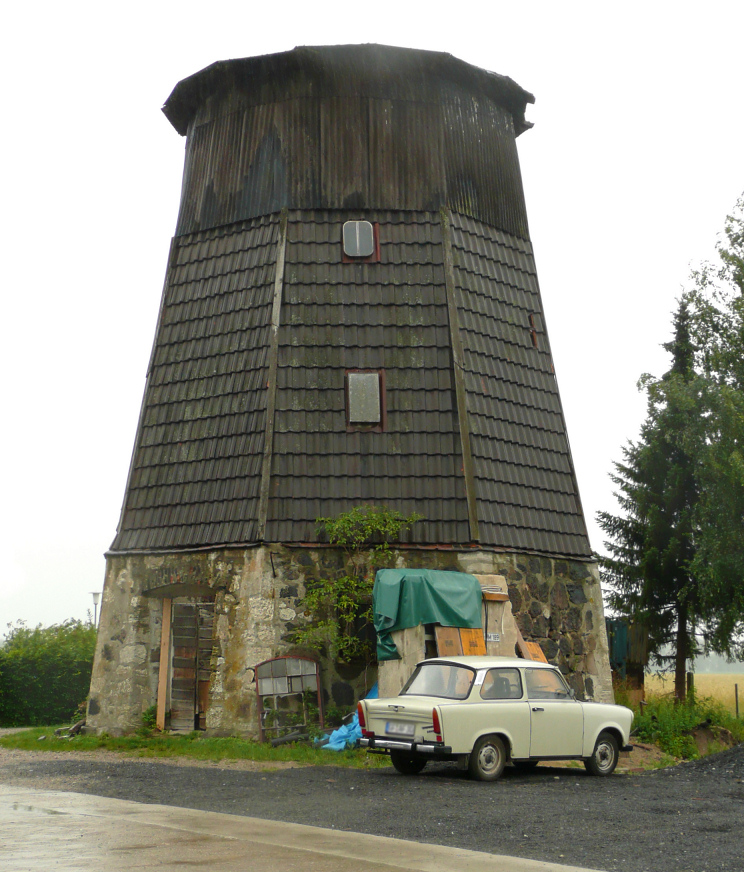 Windmühle Tappenbeck